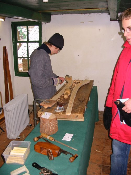 Uithollen van een doorgezaagde berkenstam voor een Midwinterhoorn. Fotograaf: J.A.C. de Kroon. Gemaakt op 27-12-2005 in het Openluchtmuseum te Arnhem